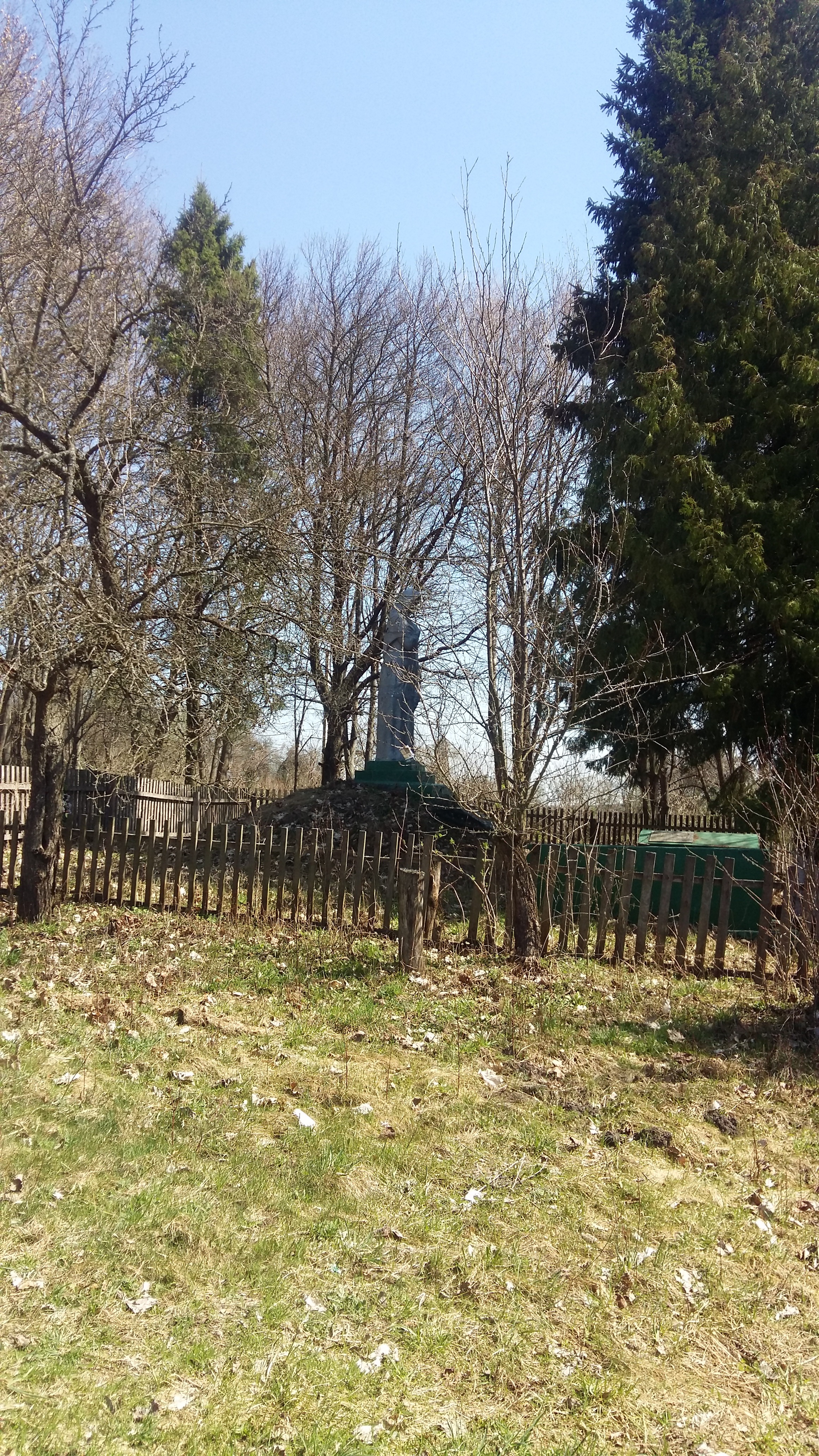 Мемориал Славы в селе Викторово